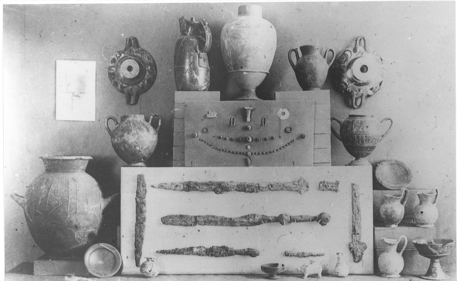 Tomba II, Balsamario a forma di cinghiale 136 ceramica etrusco corinzia, Aryballos globulare 135, scavi 1896, Olletta in bucchero con fregio ad aironi VI sec a.C. scavi del 1896, Oinochoe in bucchero con testa di femminile fincheggiata da due serpenti. VI sec a.C. Calice 133 in bucchero, Onochoe 141 in bucchero, Piattelli in bucchero 139-140. pezzi adespoti in bucchero; Oinochoe 160, Olpe 164, Kantharoi 161-163 buccheri della prima meta' seconda meta' del IV a.C. manufatti con analogie riscontrabili a Vulci, Orvieto, Poggio Buco, Chiusi e alla necropoli della Acciaierie di Terni. Anfora decorata con impressioni a cerchielli punzonati e fregi impressi con cilindretti di produzione artigiana locale, scavi del 1896, Firenze Museo Archeologico. Kylix due, e un certo numero di vasi Attici inseribili nel Leafless Group: Anfora a f.n. colla rappresentazione d'Ercole Musagete, che suona la lira innanzi a Giove, [13] Berlino 1857 VI sec a.C. Pittore di Londra B 228. Kylix a figure rosse, recante medaglione una figura di negro armato, conservata al Louvre VI sec a.C. Kylix a figure rosse, firmata dal vasaio Hieron riferibile alla prima attivita' di Makron 490 a.C. conservata al Fitzwilliam Museum di Cambridge. [14]